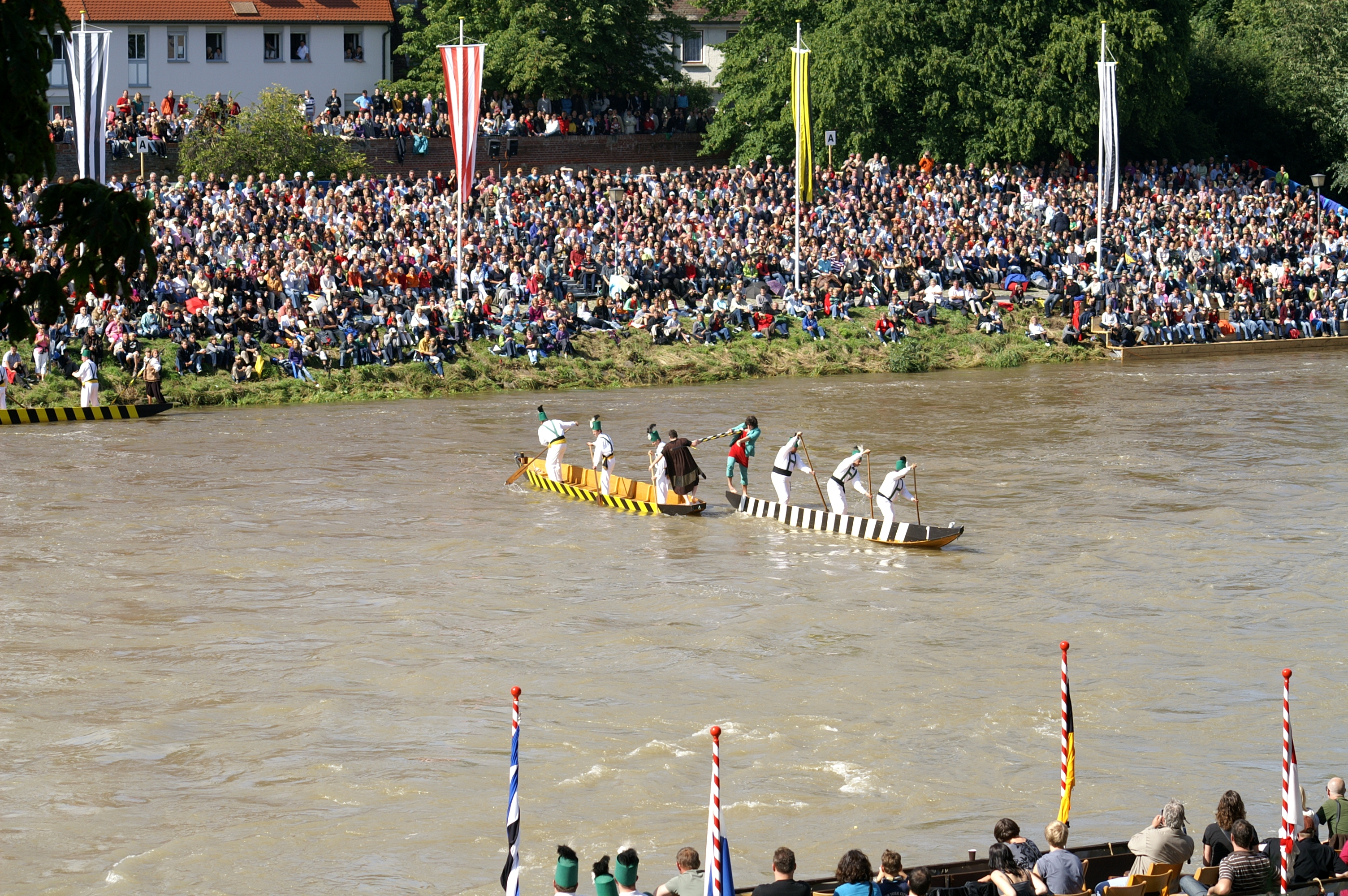 Fischerstechen in Ulm